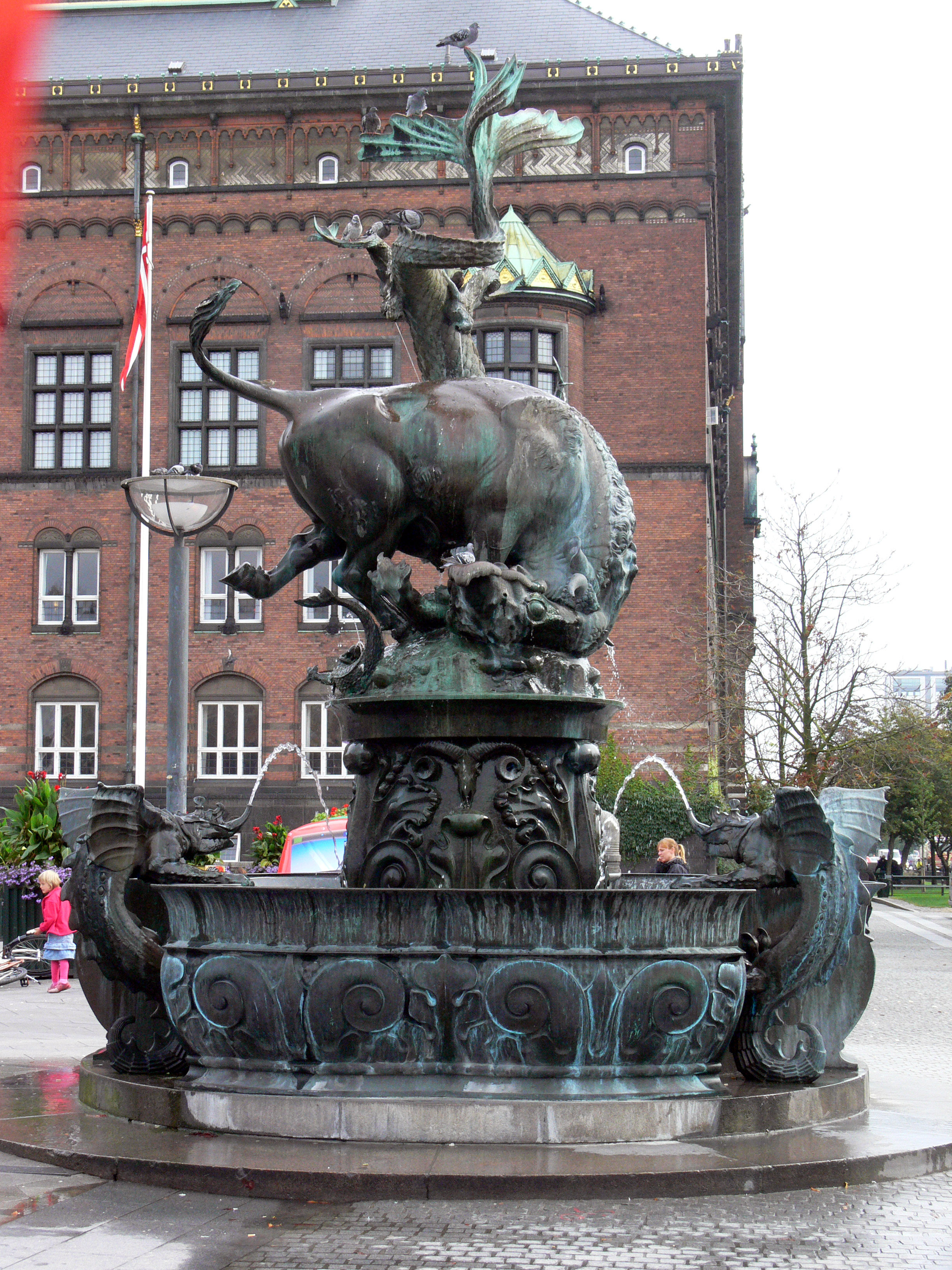 Radhuspladsen. Brunnen.